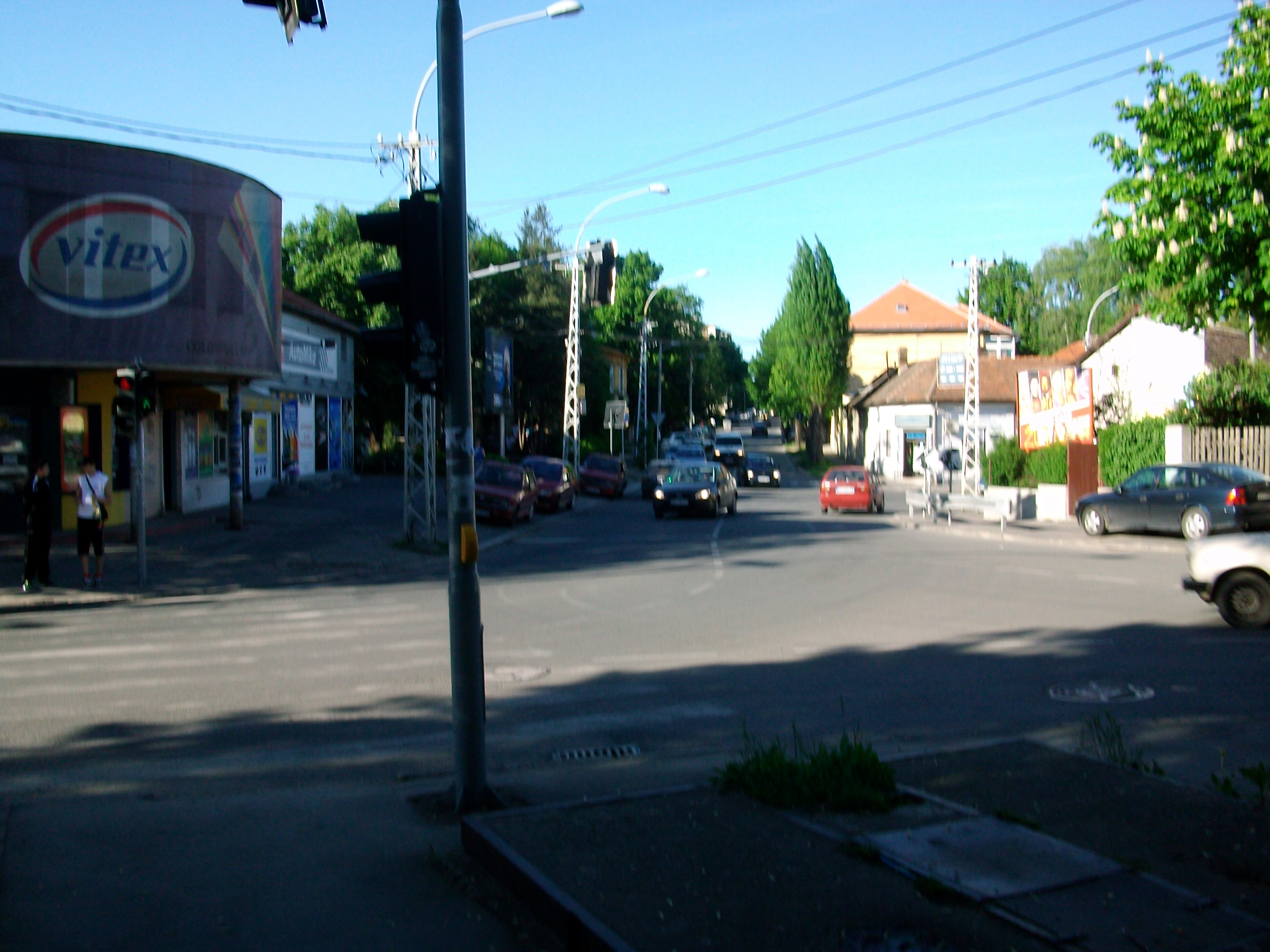 Калварија